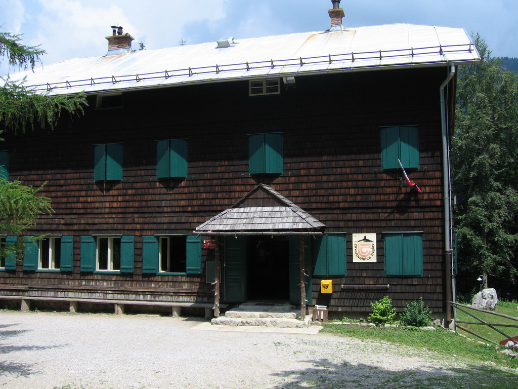 Dom pod Storzicem